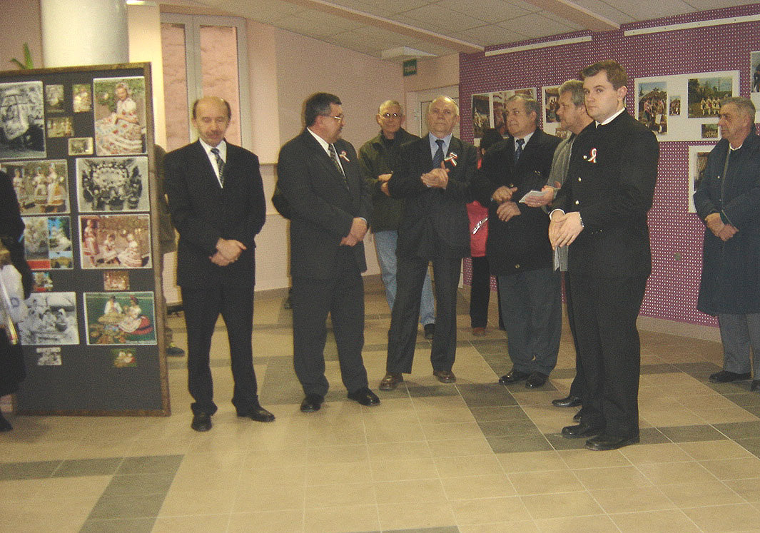 Narodne nošnje na razglednicama, izložba, Beli Manastir, III. 2006.